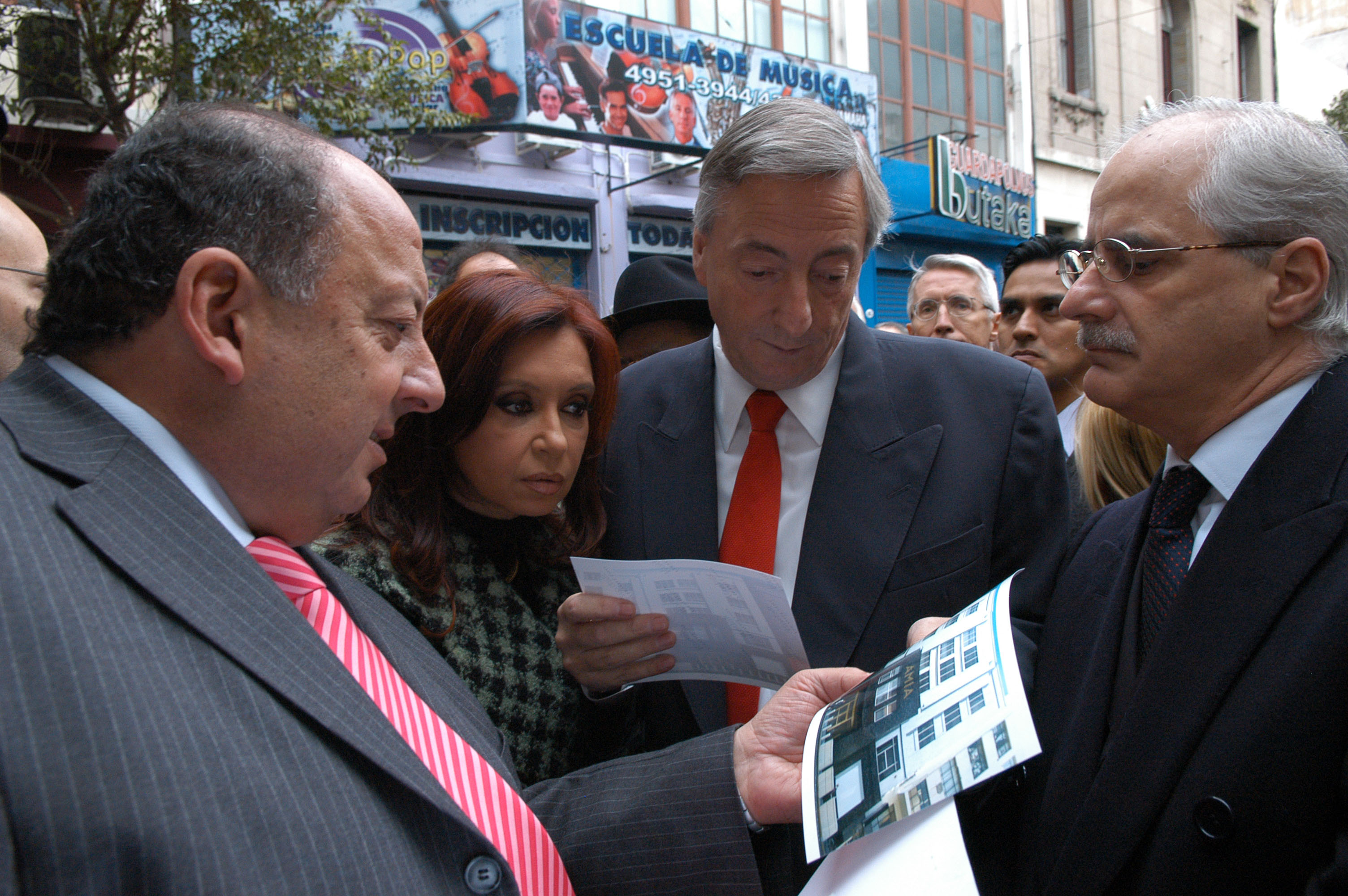 El presidente Néstor Kirchner y la senadora Cristina Fernández durante el acto en recordación del atentado que destruyó la mutual judía AMIA 13 años atrás